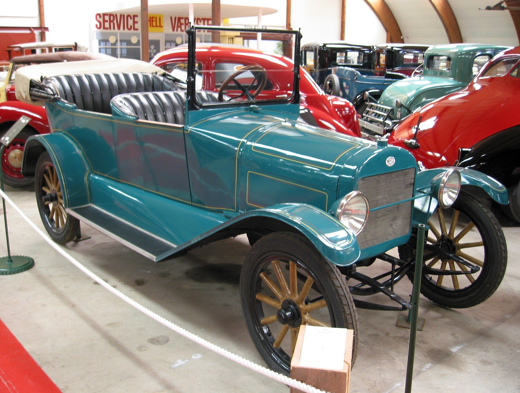 Metz Modell 25 Touring (1915) im Aalholm Automobil Museum